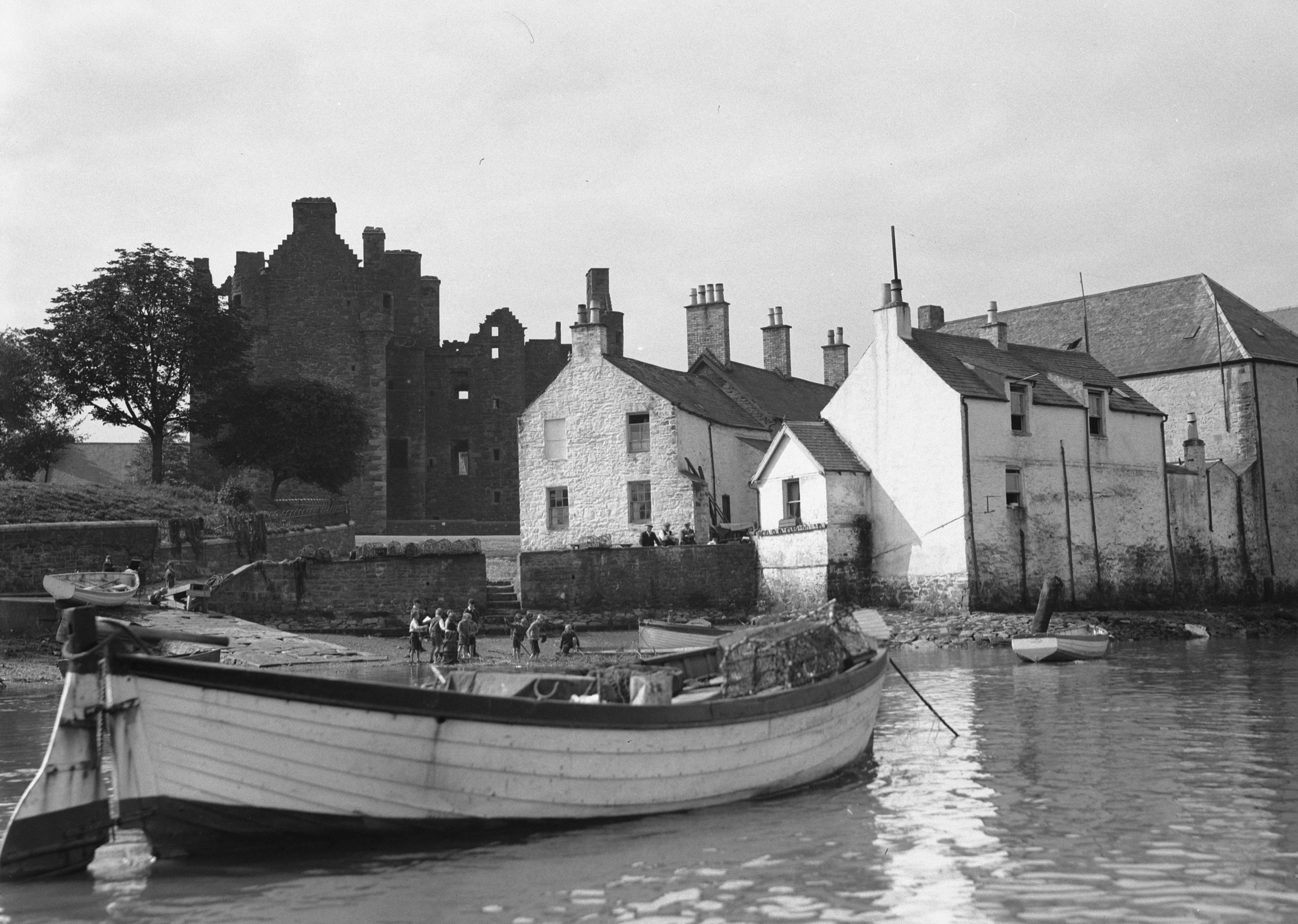 Collectie / Archief : Fotocollectie Van de Poll Reportage / Serie : Schotland - Kirkcudbright Beschrijving : Kasteelruïne aan een rivier in Kirkcudbright Datum : augustus 1934 Locatie : Groot-Brittannië, Kirkcudbright, Schotland Trefwoorden : kastelen, rivieren, schepen Fotograaf : Poll, Willem van de Auteursrechthebbende : Nationaal Archief Materiaalsoort : Negatief (zwart/wit) Nummer archiefinventaris : bekijk toegang 2.24.14.02 Bestanddeelnummer : 190-1107